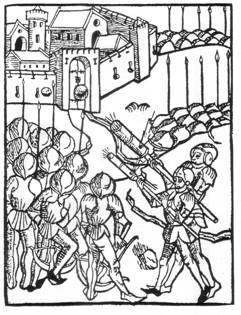 Stangenbüchsen bei der Belagerung einer befestigten Stadt. Holzschnitt aus Lucas Brandis Rudimentum noviciorum sive Chronicarum et historiarum epitome um 1475